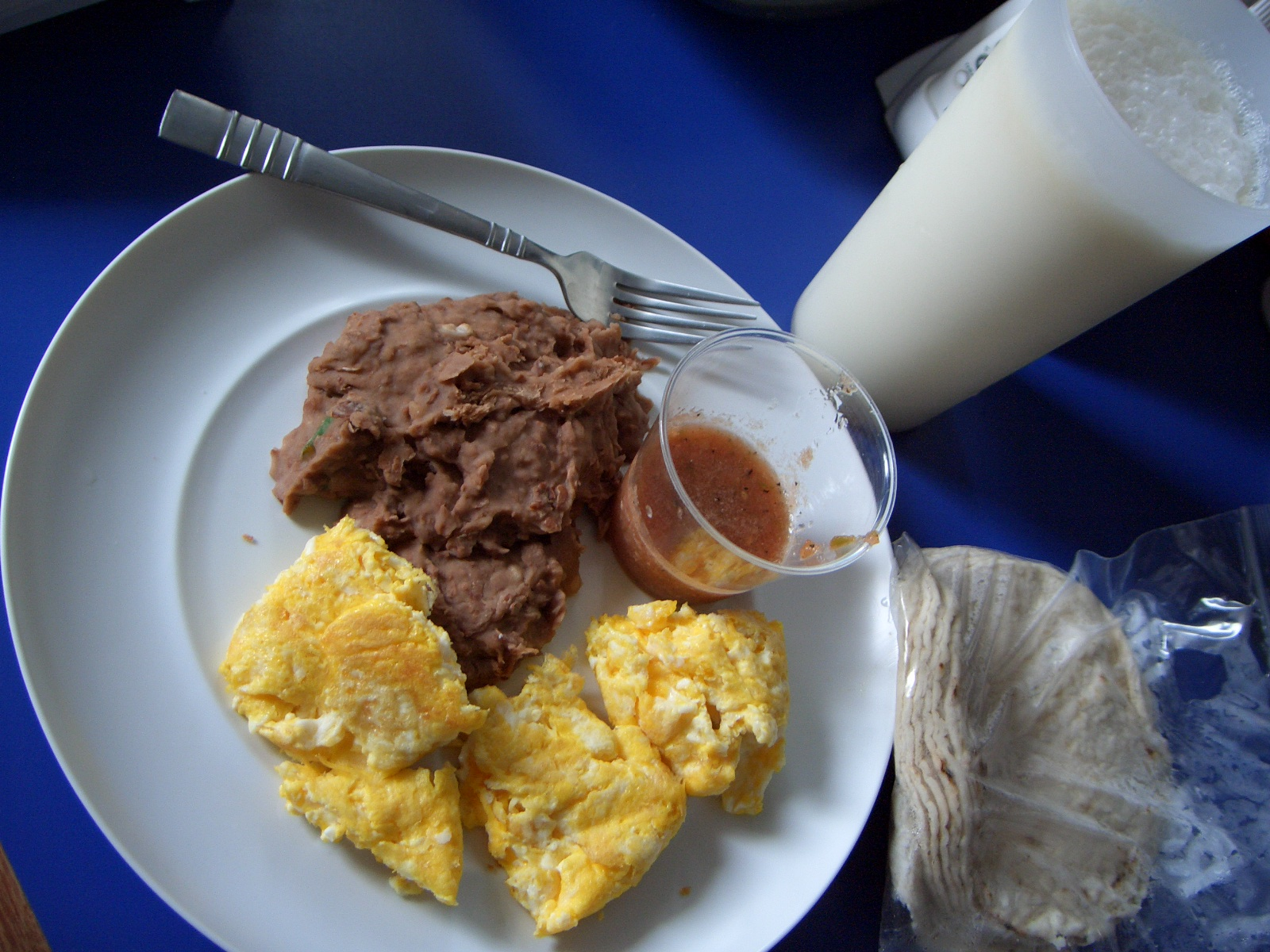 Mexican breakfast with huevos, frijoles, tortillas, y un licuado